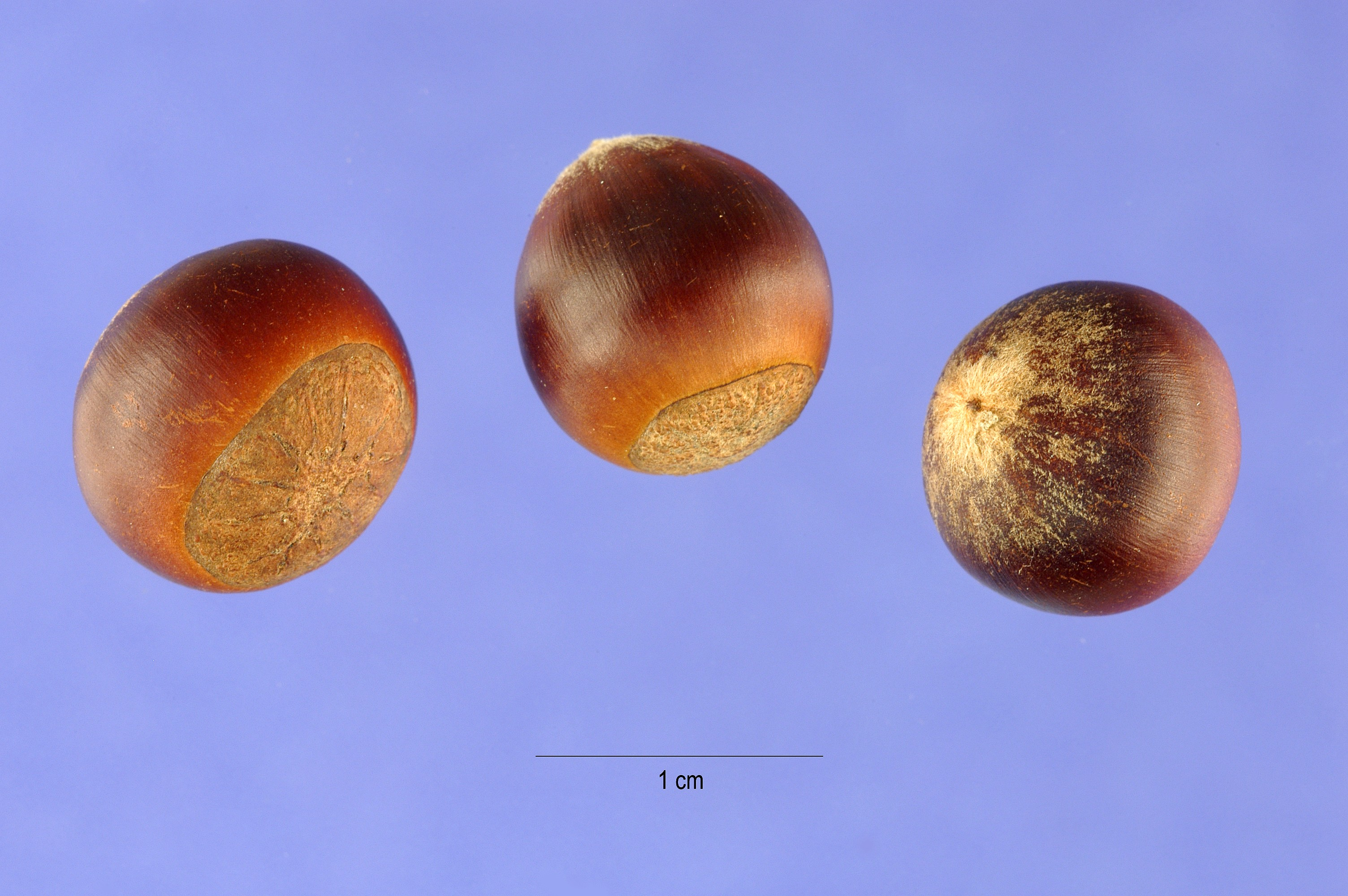 Castanea pumila (Chinquapin, castaño chinkapin, castaño enano) - Nueces globulares sueltas.